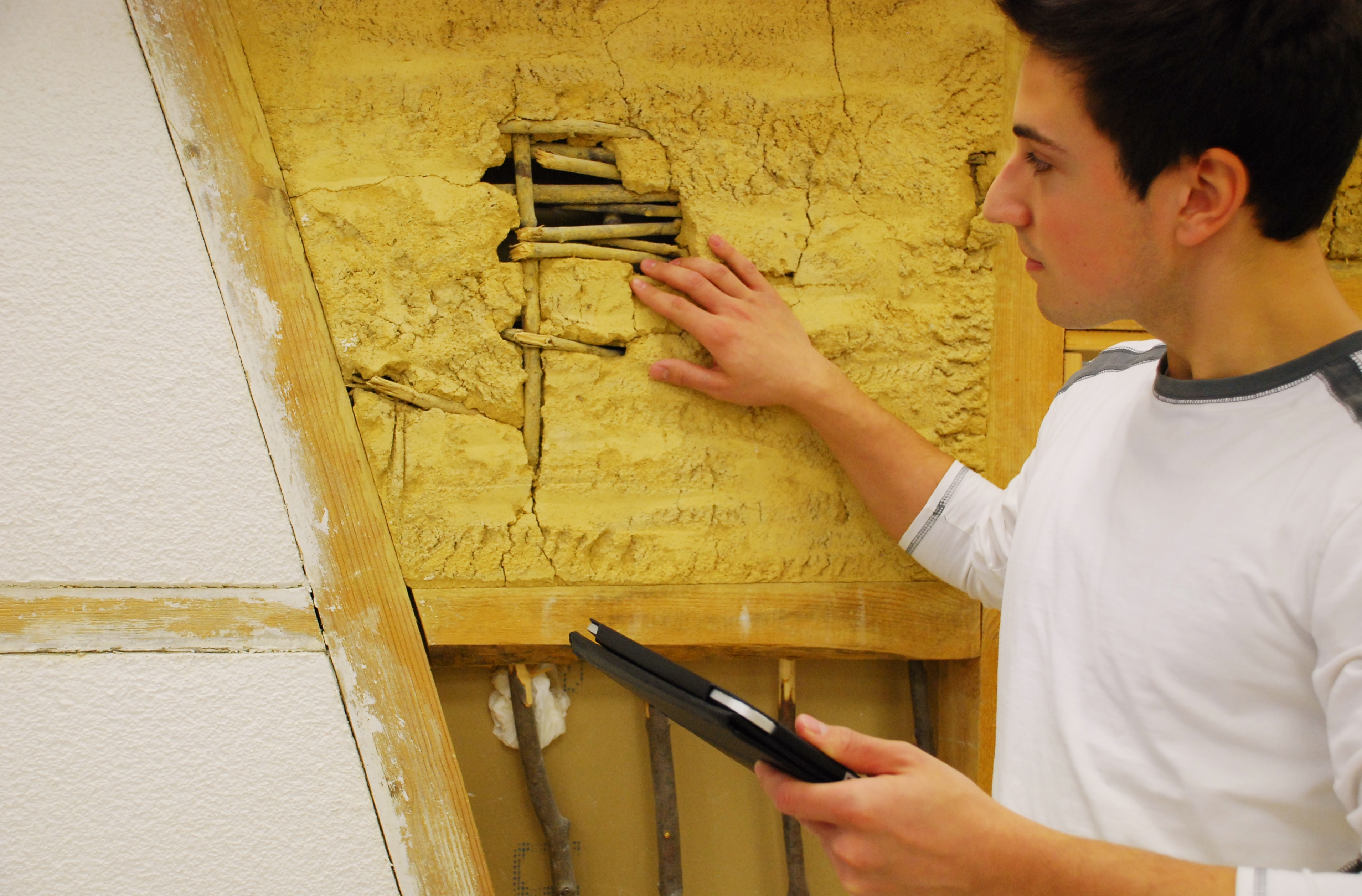 Angehender Ausbau-Manager bei der Beurteilung eines Schadens am Lehmputz